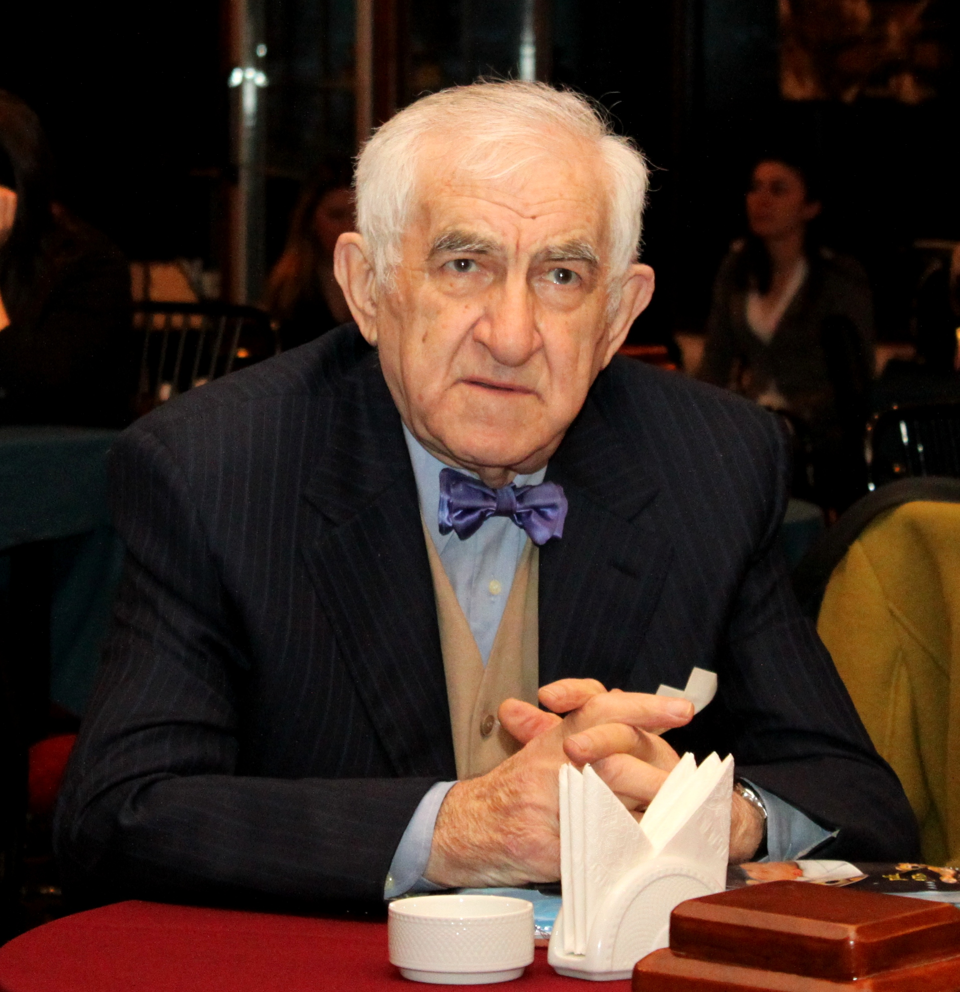 Азербайджанский композитор Тофик Бакиханов.